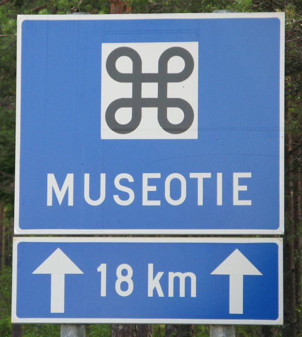 Museotien opastekilpi